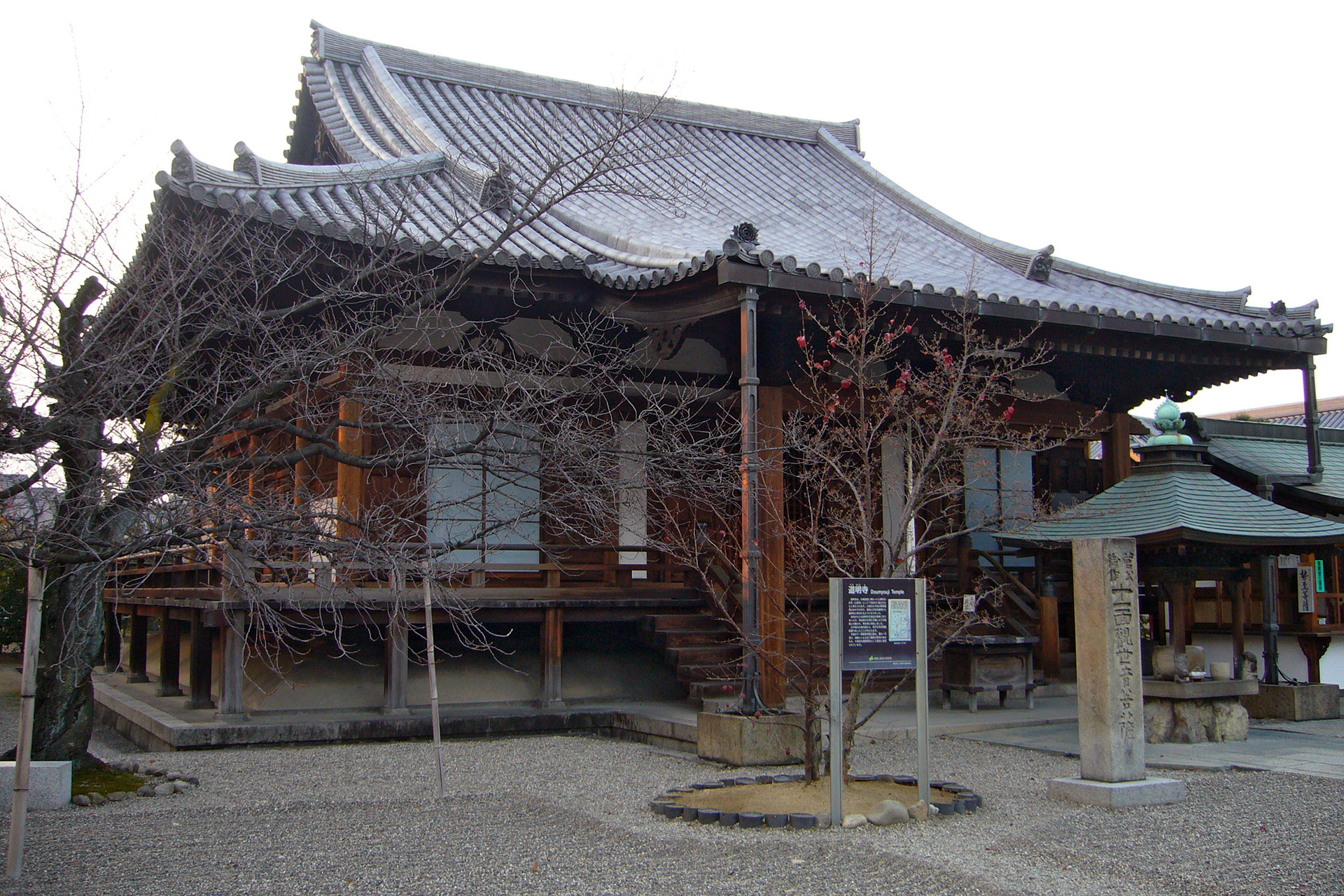 Domyoji in Fujiidera, Osaka, Japan